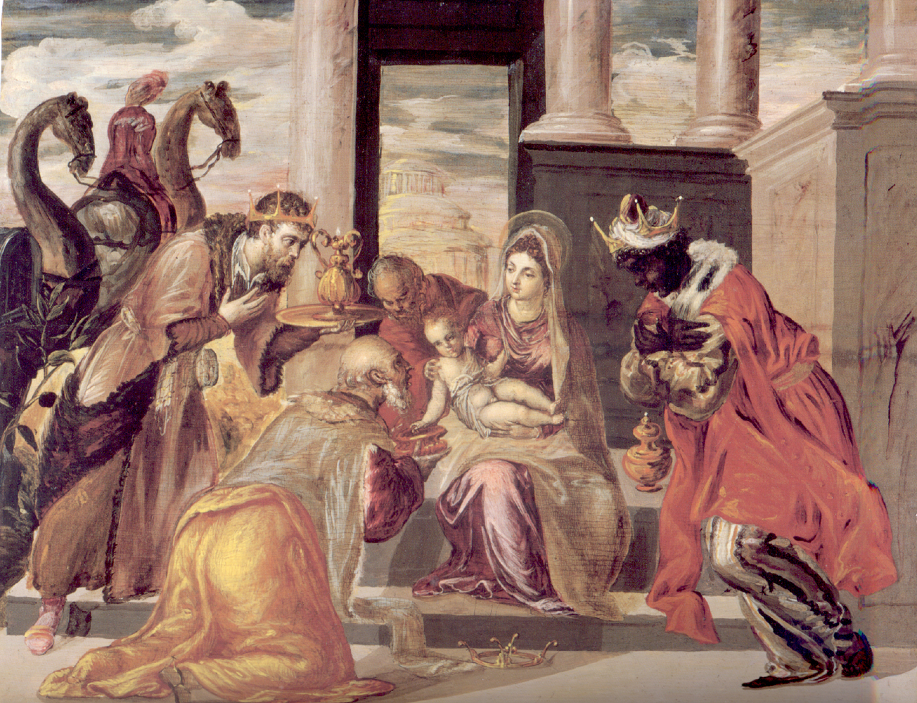 El Greco - The Adoration of the Shepherds (1550-75) collection private Lozanna